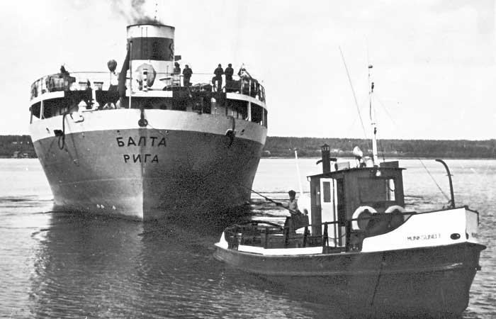 Bogserbåten Thyra 1 (mellan 1930 och 1967 Marksund 7)